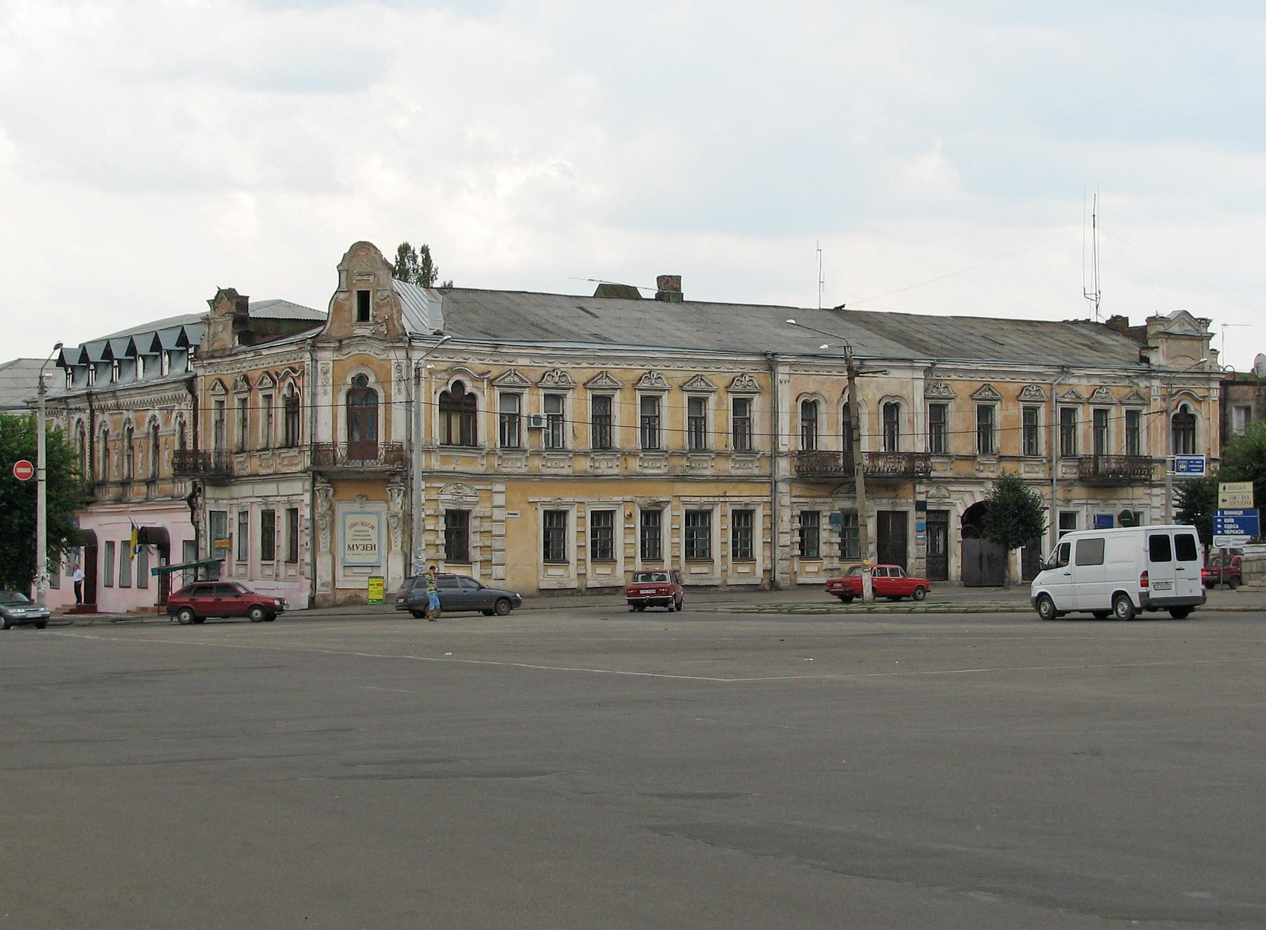 Готель «Європа» (мур.), Умань, вулиця Жовтневої революції, 1/2